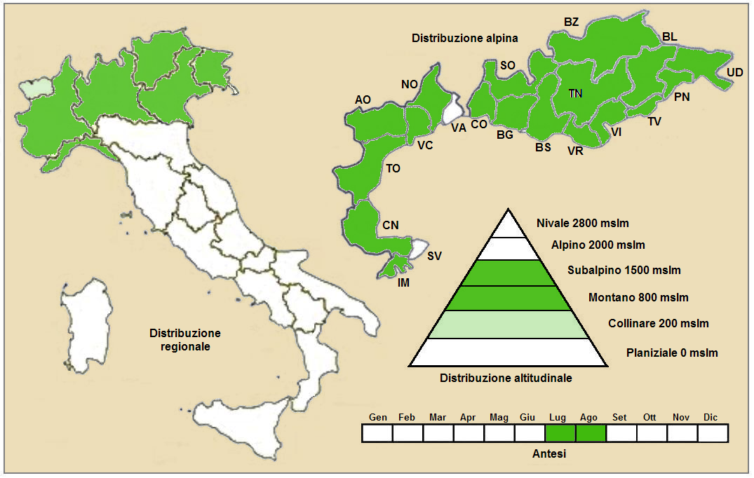 Aconitum degenii ssp. paniculatum (Arcang.) W.Mucher (1993) - Distribuzione